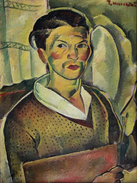 Tasso Marchini (1907-1936) - Autoportret cu paletă, ulei pe pânză, nedatat, 60x44 cm.